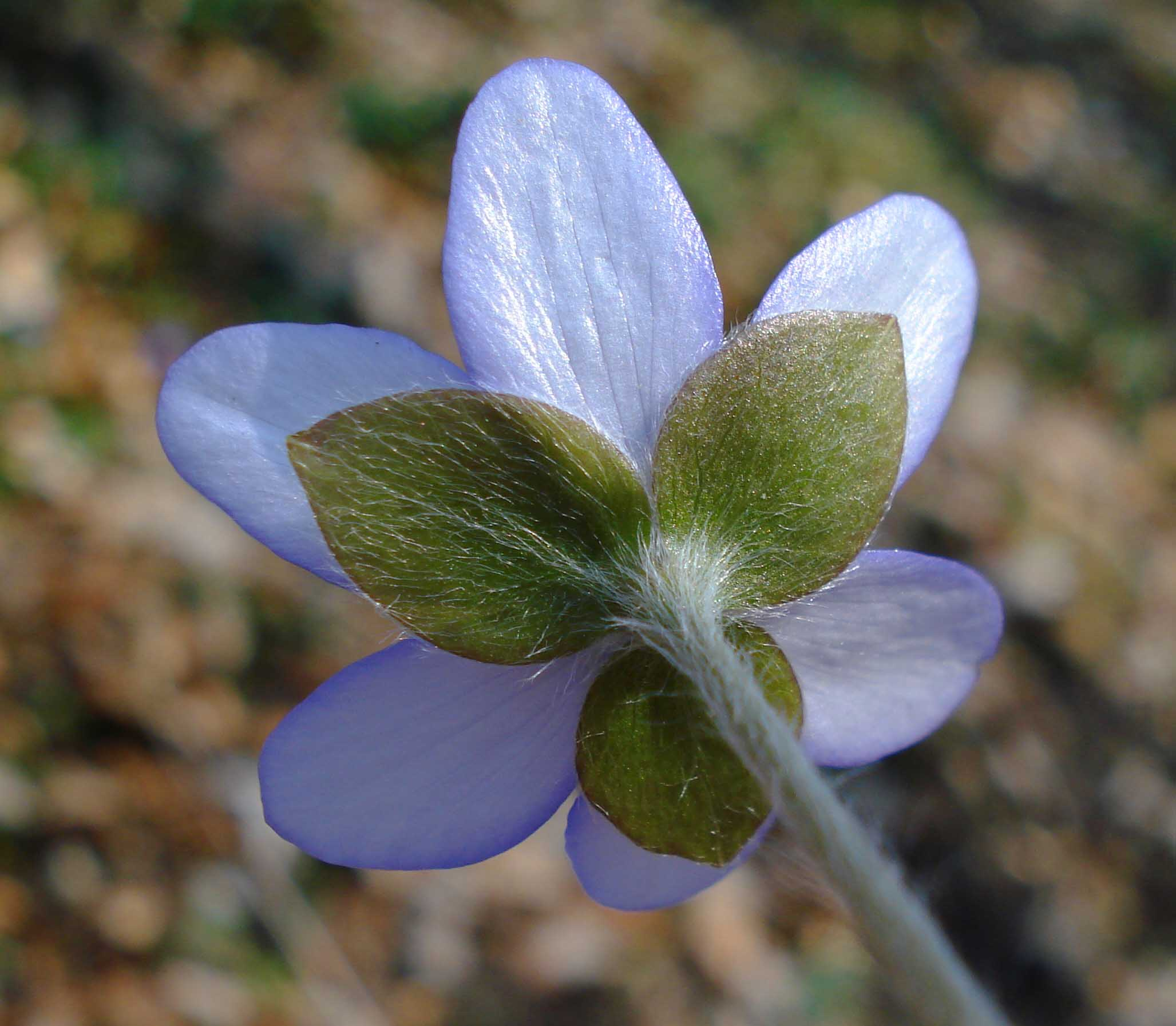 Hepatica nobilis: Blüte mit Kelchblättern